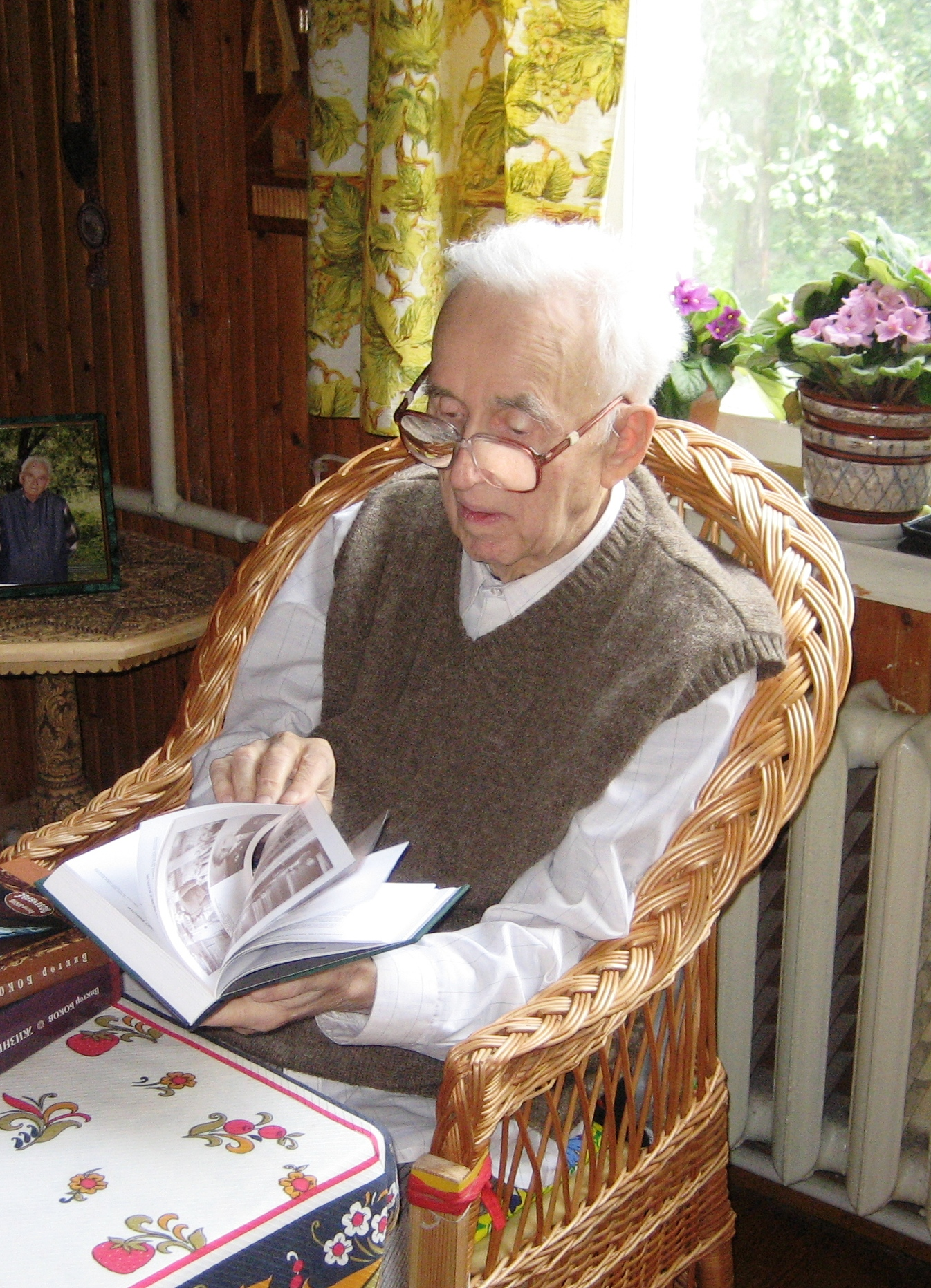 Виктор Боков на даче в Переделкино. 18 августа 2007 г.